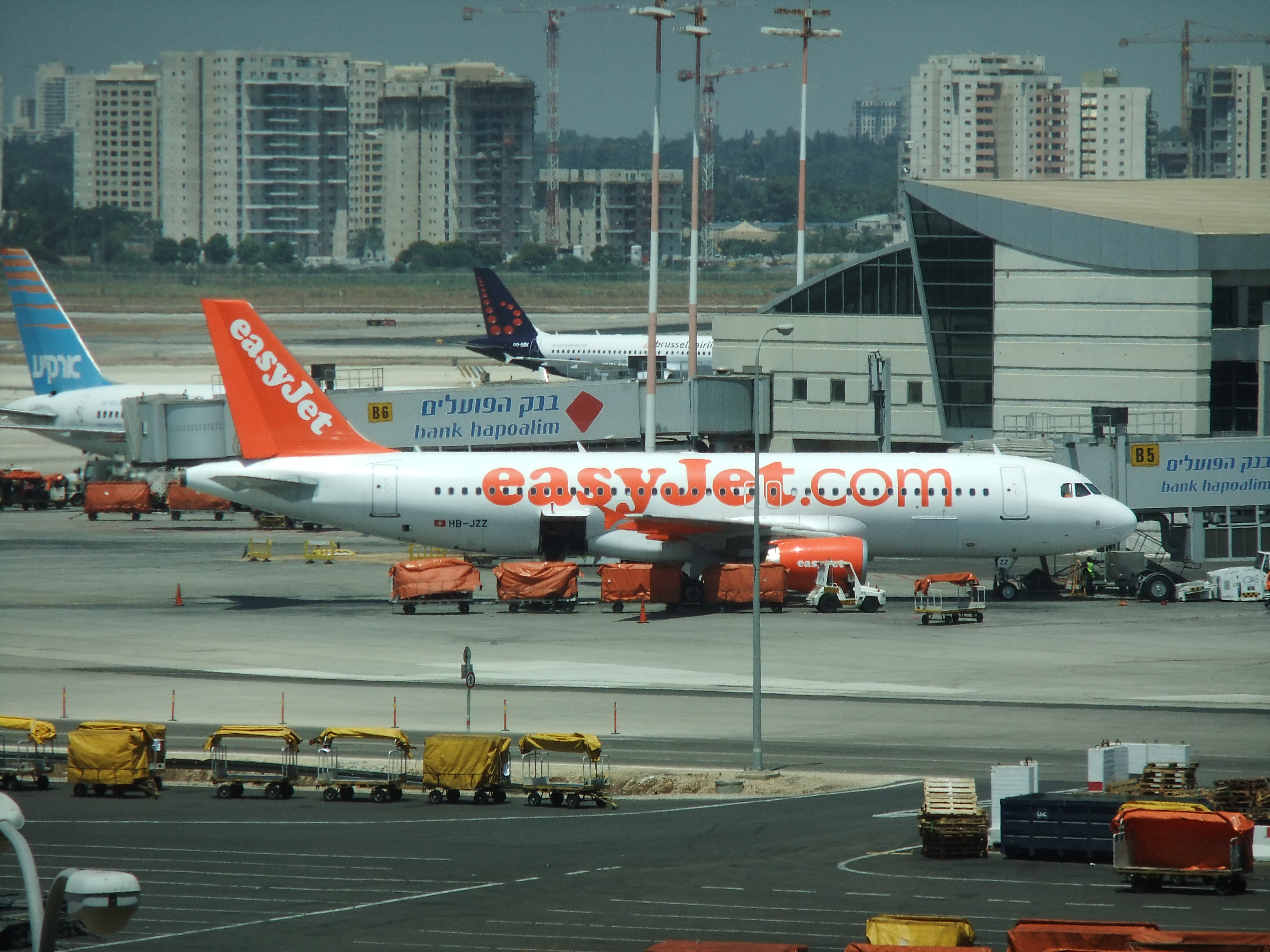 מטוס בשלוחה B